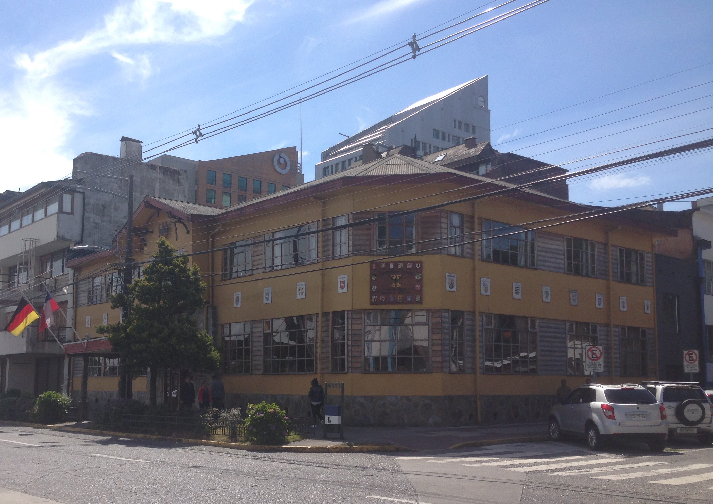 Club Aleman de Puerto Montt al año 2018